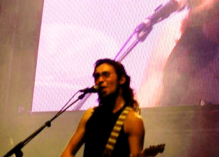 Oriol Farré del grup musical català Gossos, en un concert.